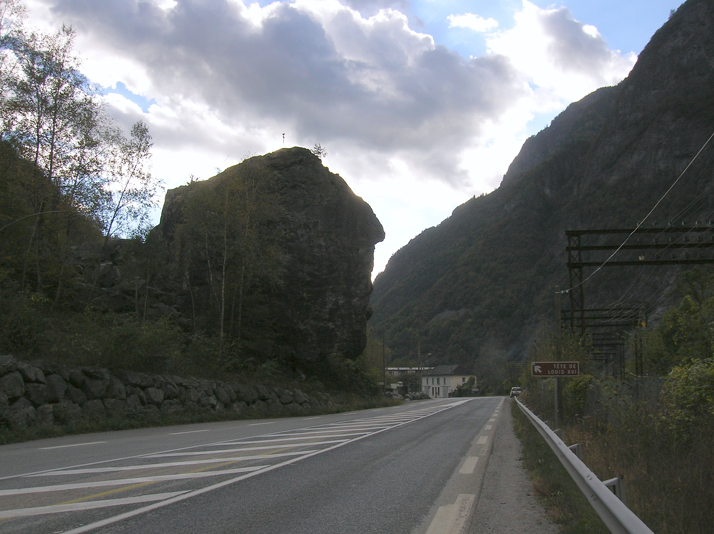 Tête de Louis XVI. Rioupéroux, Livet-et-Gavet, Isère, Rhone-Alpes, France.